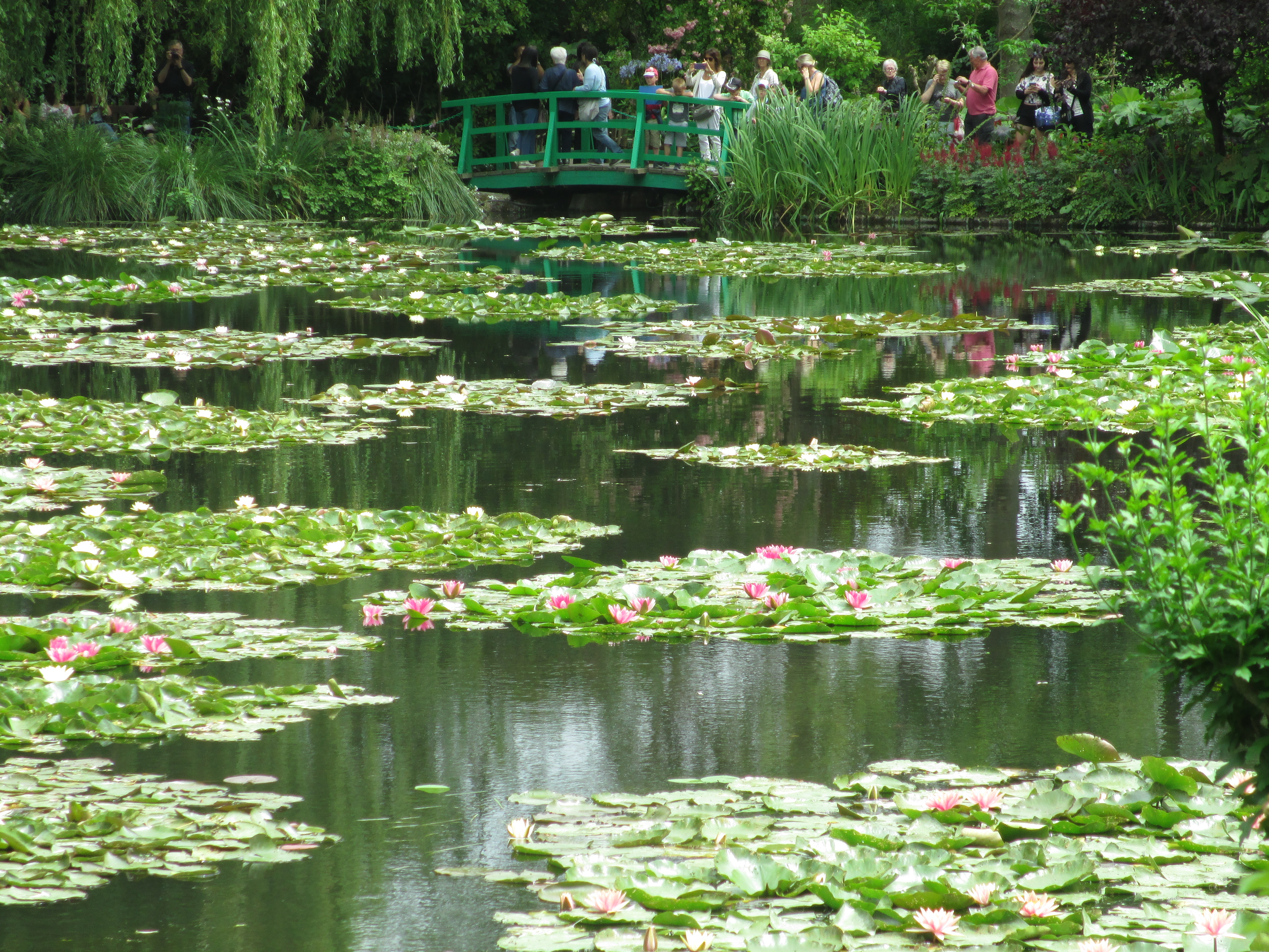 הגן היפני בבית קלוד מונה בז'יברני